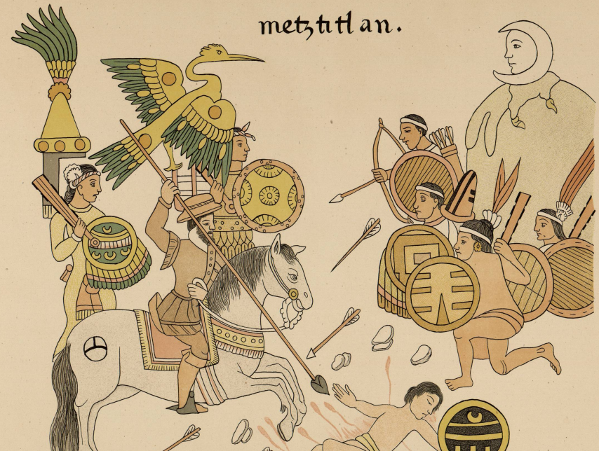 Fragmento del Lienzo de Tlaxcala.